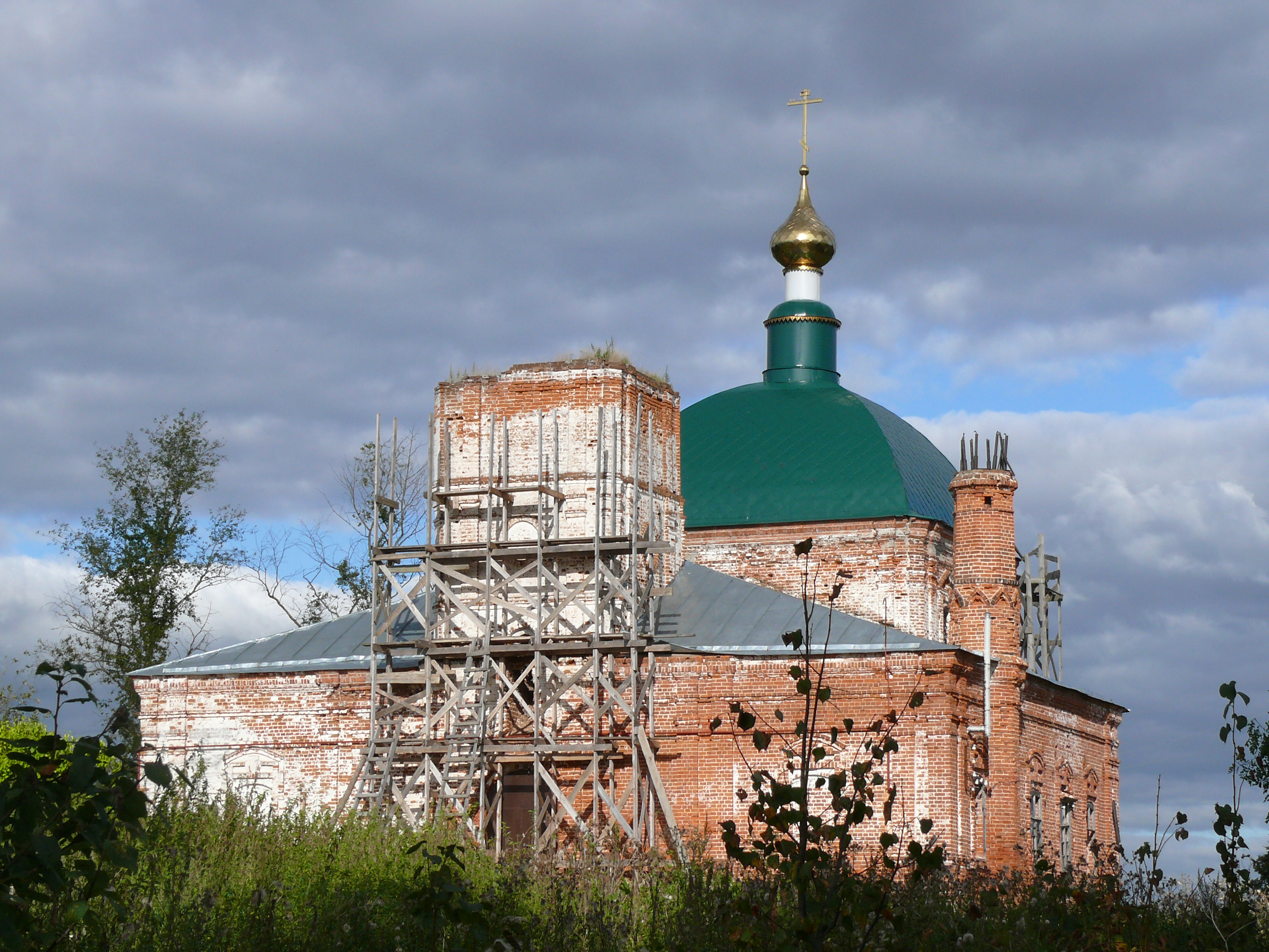 Церковь Воздвижения Креста Господня: Коверино, Камешковский район, Владимирская область